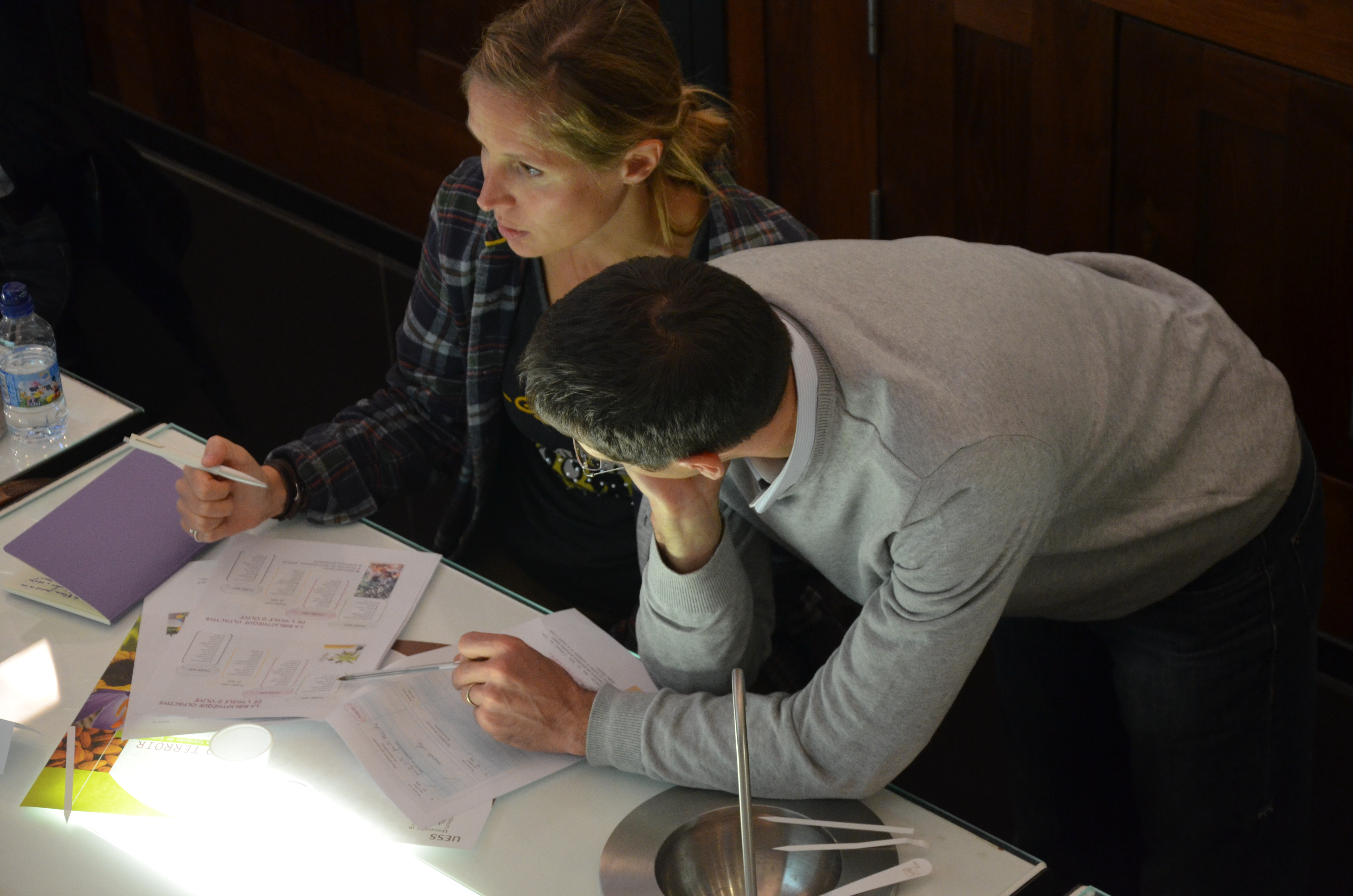 UESS Forcalquier Analyse des résultats